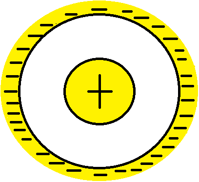 Modelo Atômico Saturniano criado por Nagaoka.